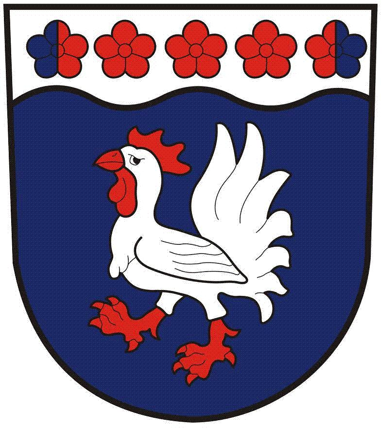 Znak obce Studnice (okres Náchod)